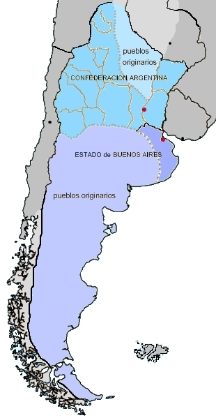 mapa de la Confederación Argentina y el Estado de Buenos Aires en 1858